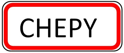 Panneau